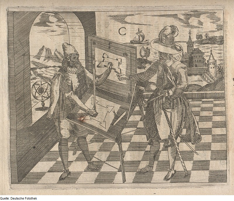 Original image description from the Deutsche Fotothek Geometrie & Perspektive & Instrument & Lot